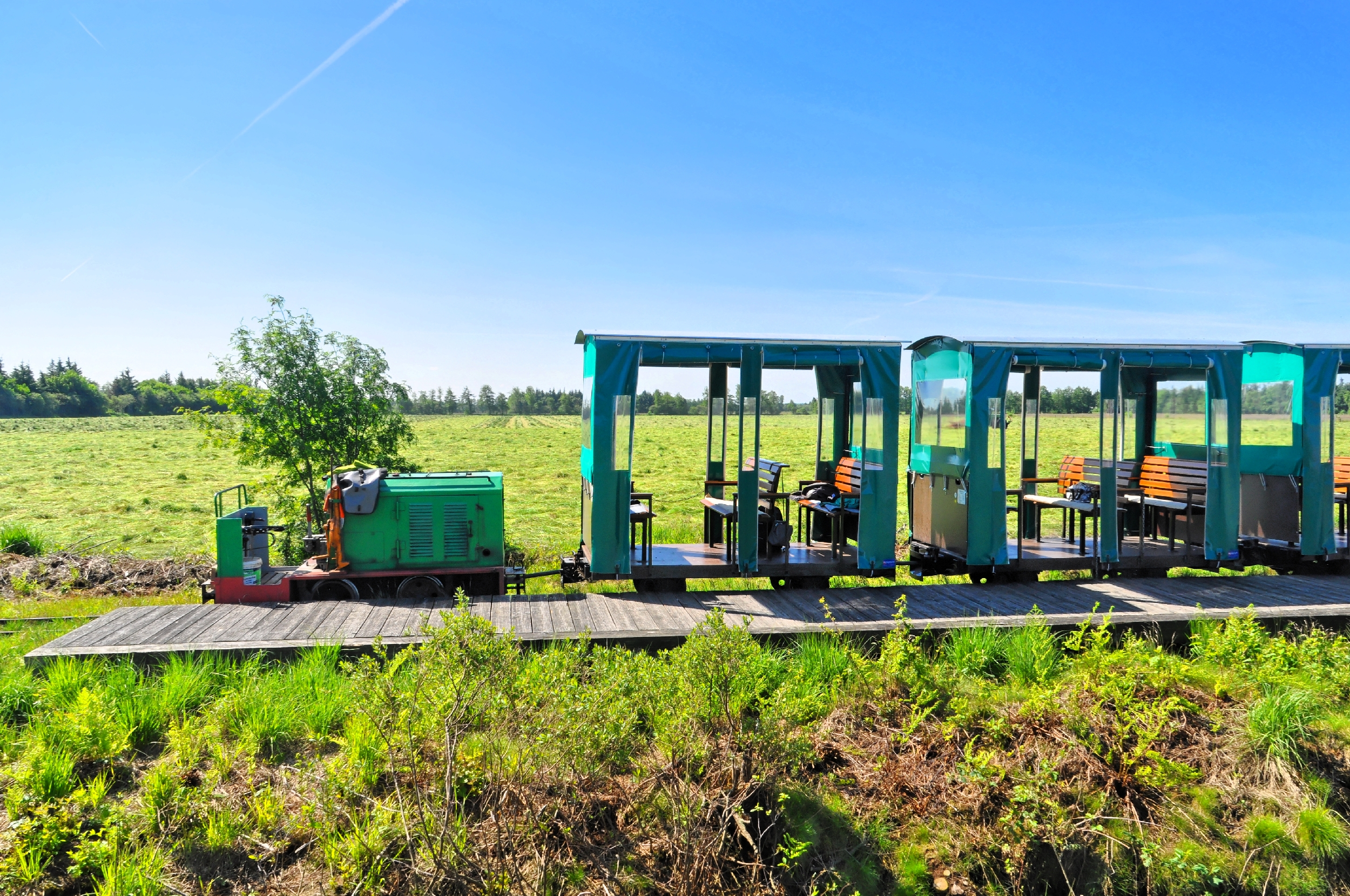 Bilder aus dem Ahlenmoor